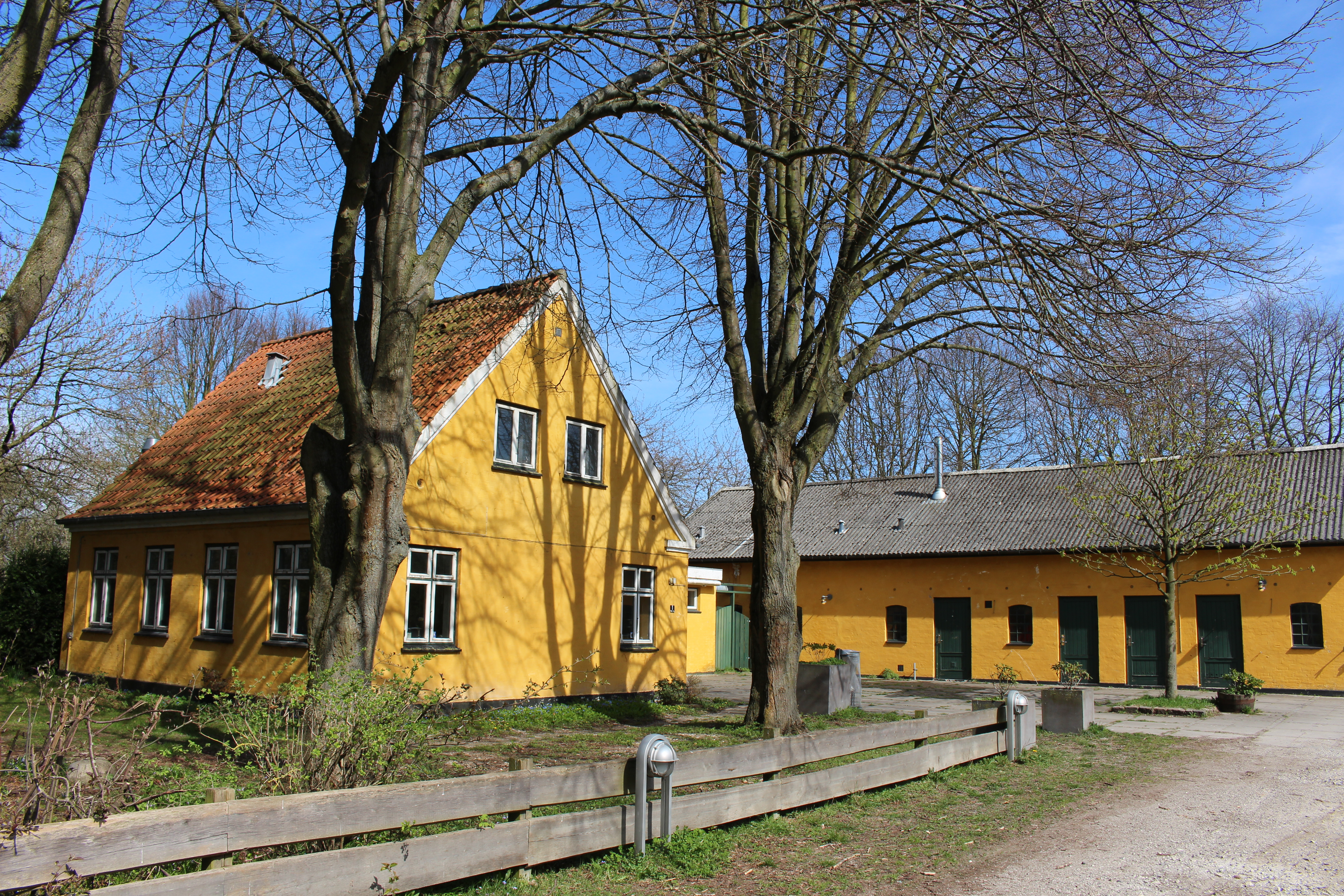 Bakkehuset i Albertslund